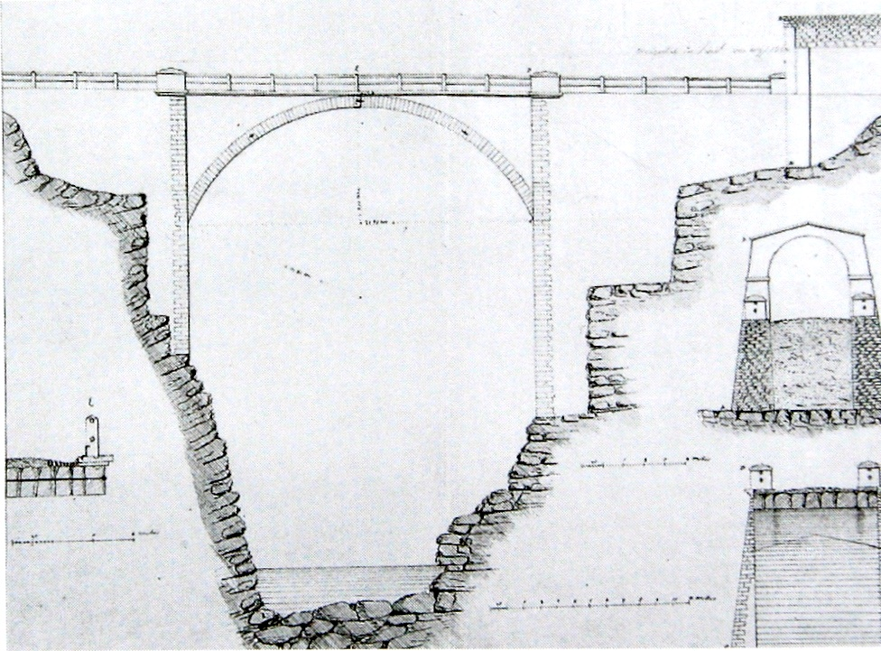 Brücke Vittorio Emanuele: Projekt für einen Neubau